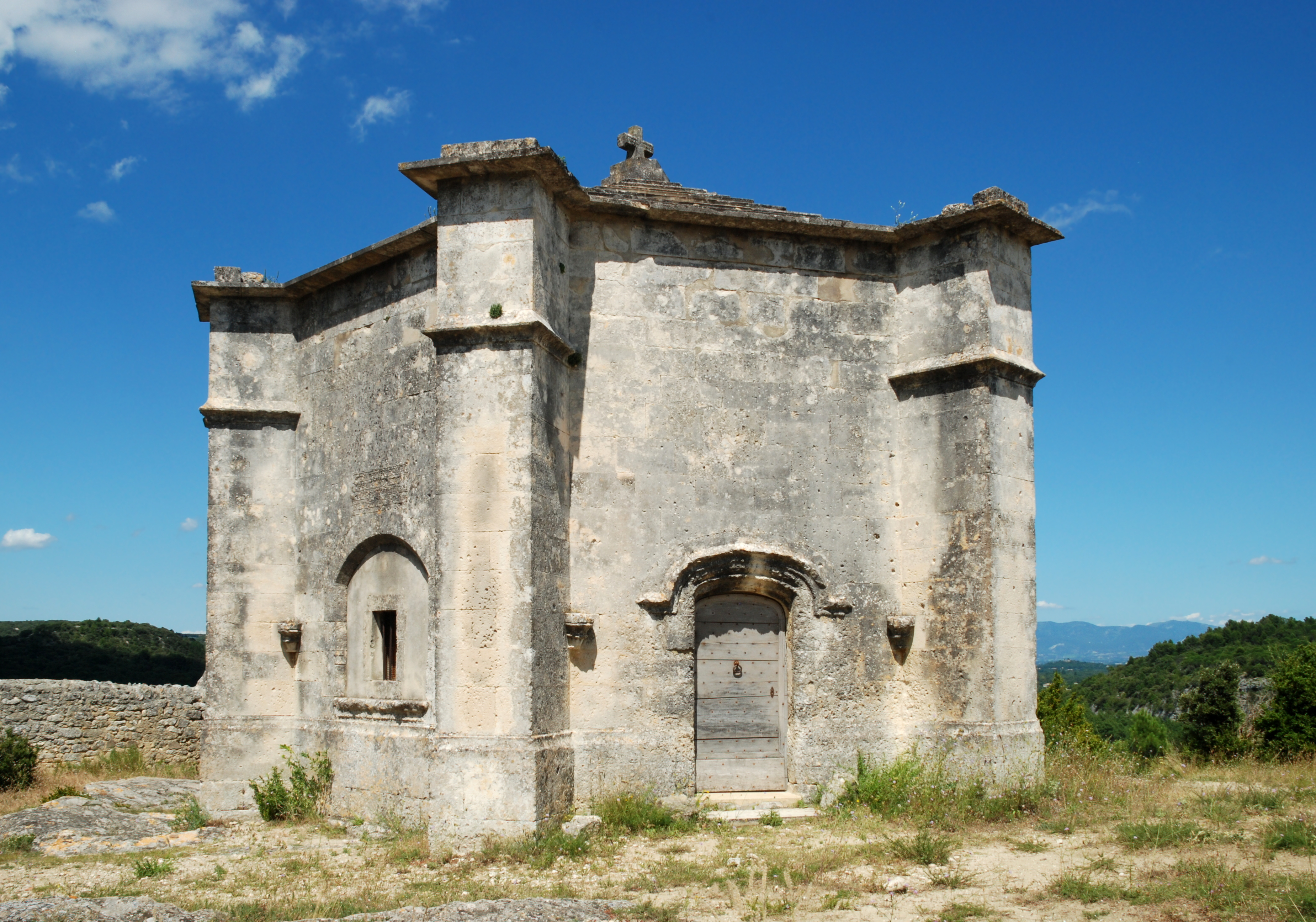 France - Drôme - Chapelle du Saint-Sépulcre de Saint-Restitut